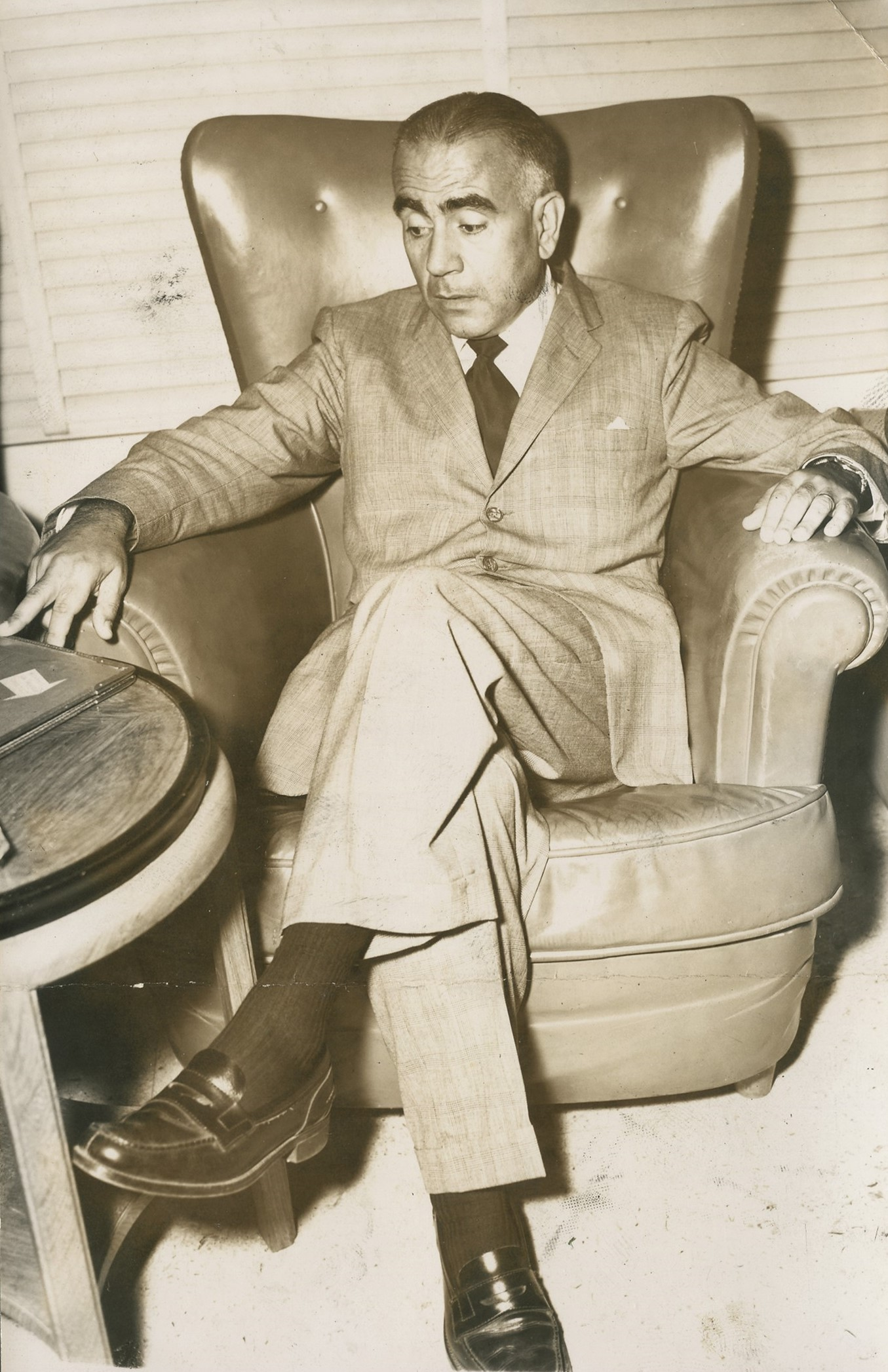 Fotografia do Fundo Correio da Manhã, sob a guarda do Arquivo Nacional.